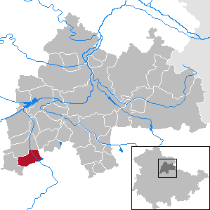 Elxleben in Thuringia - District Sömmerda